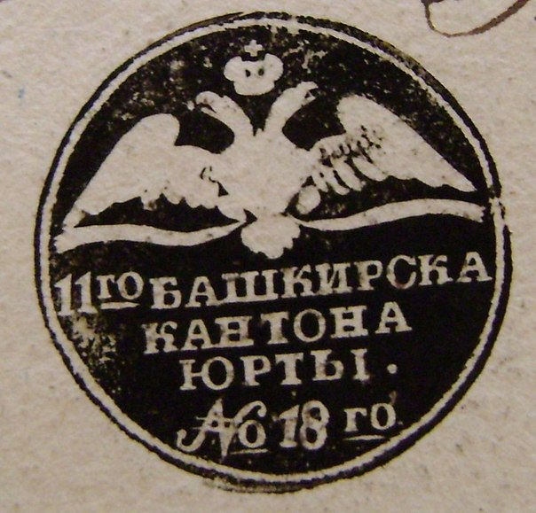 Печать 18-го юрта 11-го Башкирского кантона (мензелинские башкиры). XIX век. Из фонда ЦИА РБ.